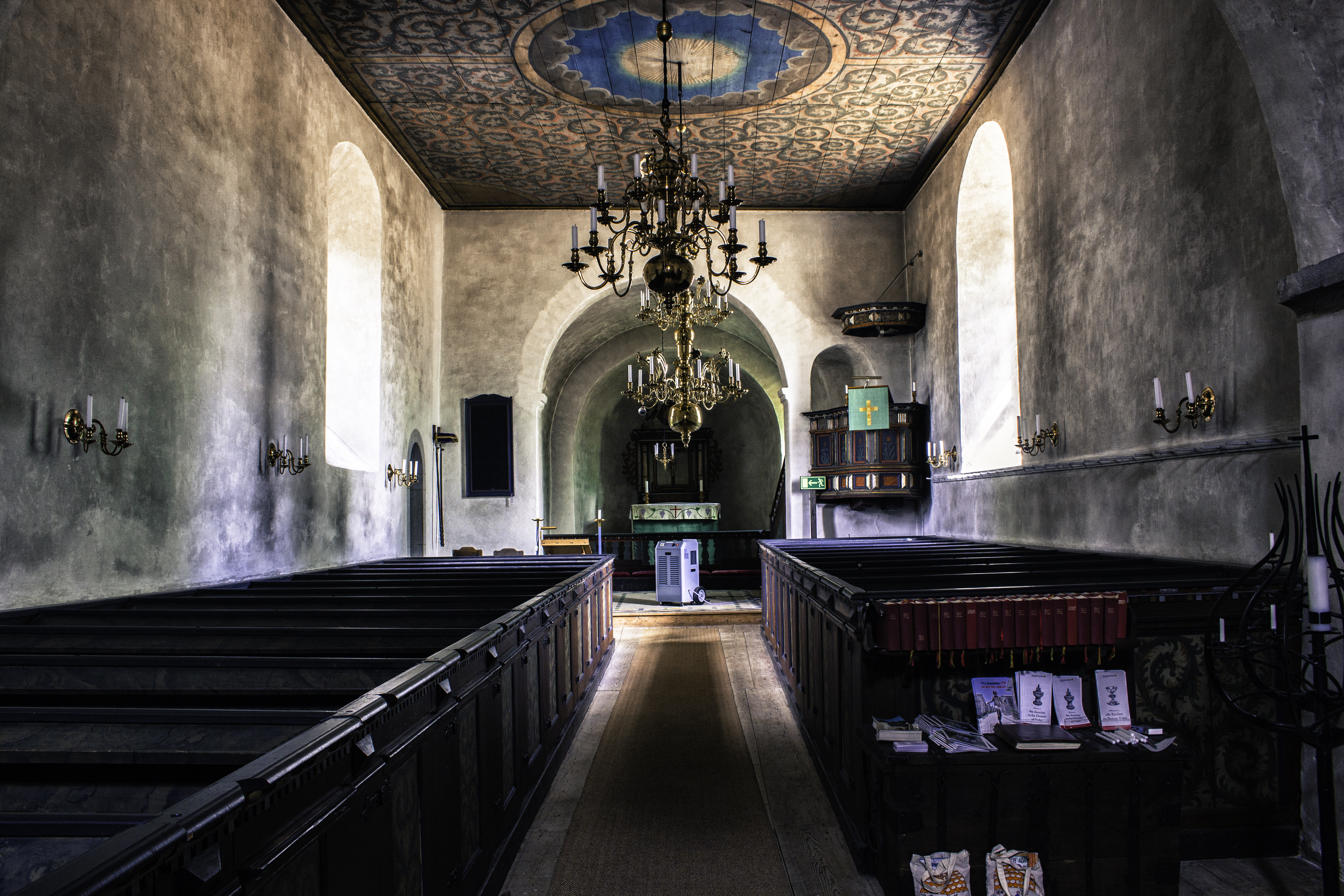 Interior da igrexa de Akebäck, na illa sueca de Gotland.